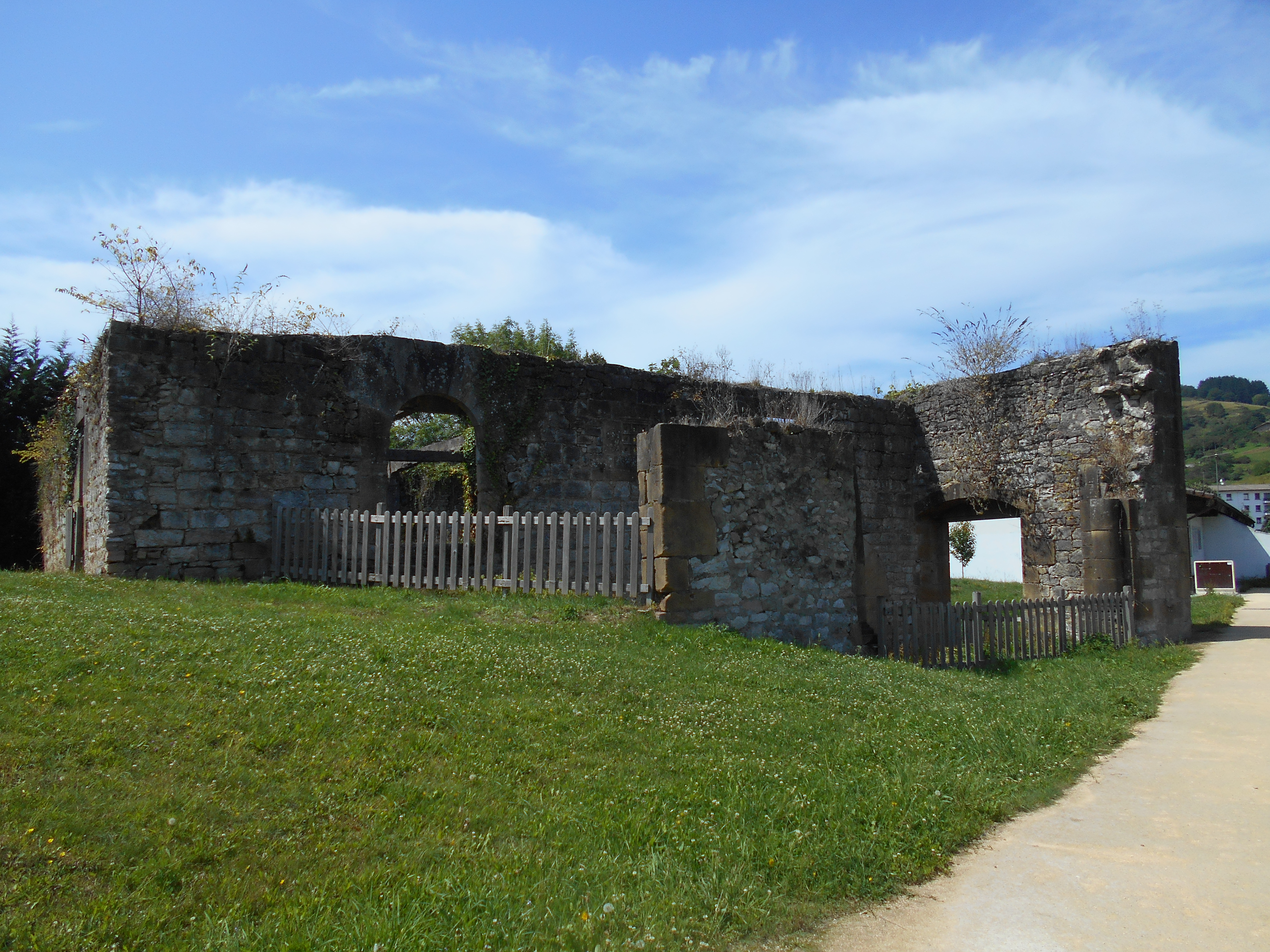 Restos de la Torre de los Zaldua